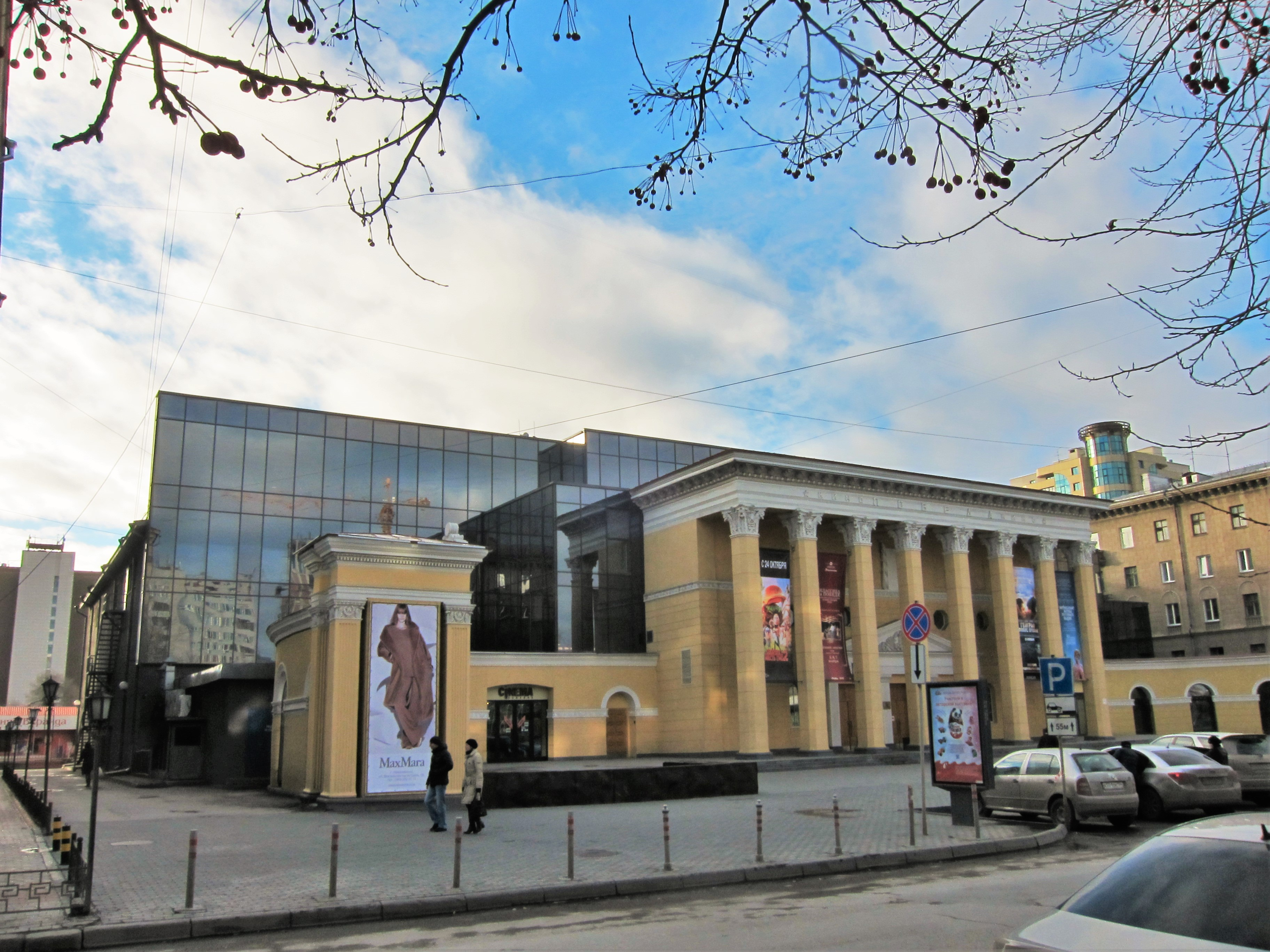 Кинотеатр «Победа» (Новосибирск, улица Ленина, 7)